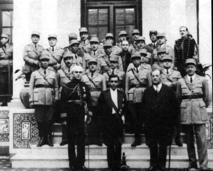 El comandante Luis Sánchez Cerro, presidente del Perú, y su gabinete. Lima, Perú, 1931.